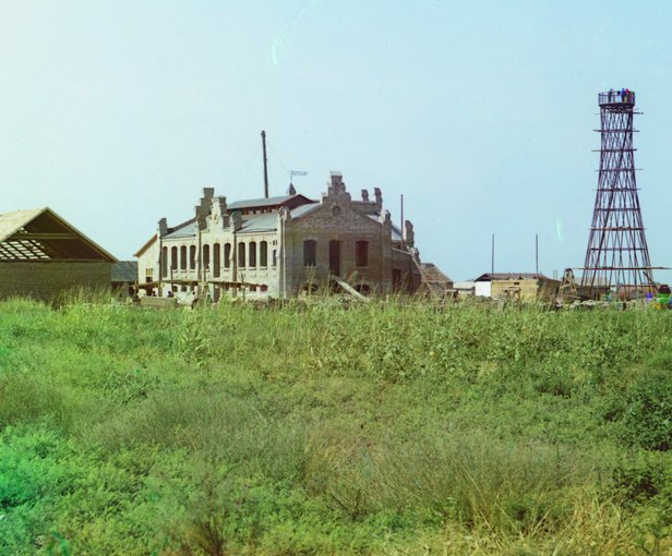 Sabirabad (Petropavlovka).